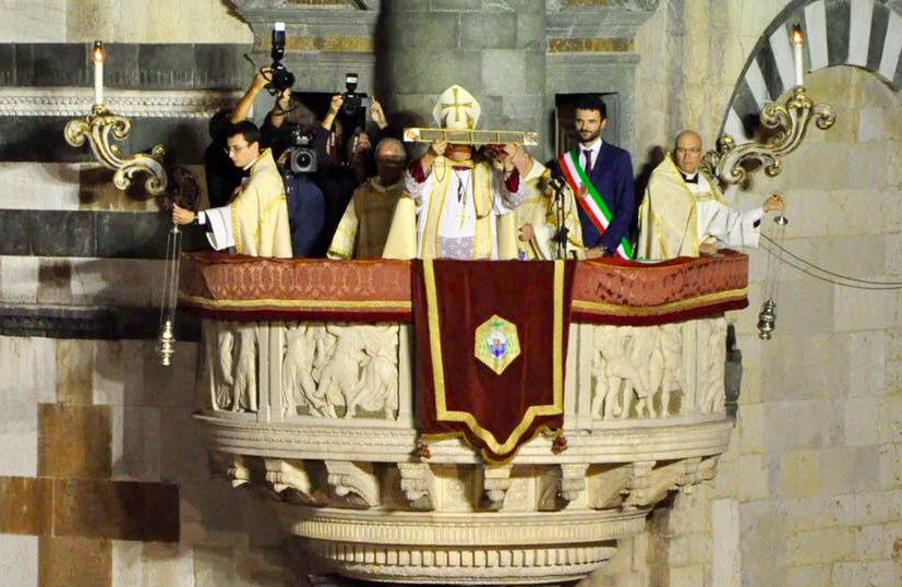 Sacra Cintola Sacro Cingolo Corteggio Storico 2018